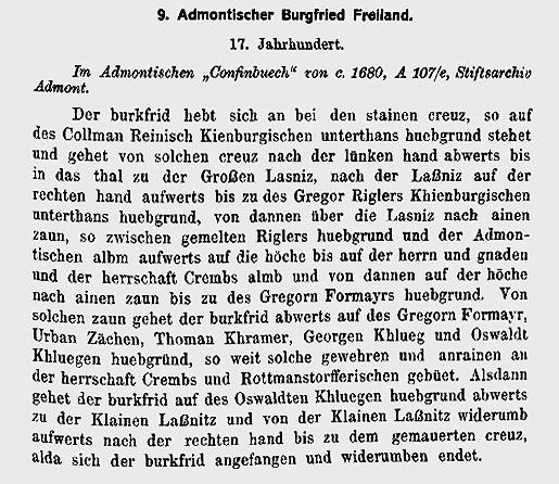 Beschreibung des Burgfrieds des Stiftes Admont in der (späteren) Gemeinde Freiland bei Deutschlandsberg einschließlich St. Oswald in Freiland und der Hebalm im Sprengel des Landgerichtes Oberwildon um das Ende des 17. Jahrhunderts